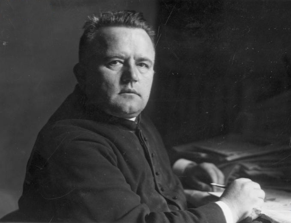 Poseł ks. Eugeniusz Okoń.